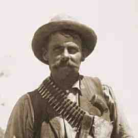 Capitán Frank S. McCombs en México durante la Revolución Mexicana